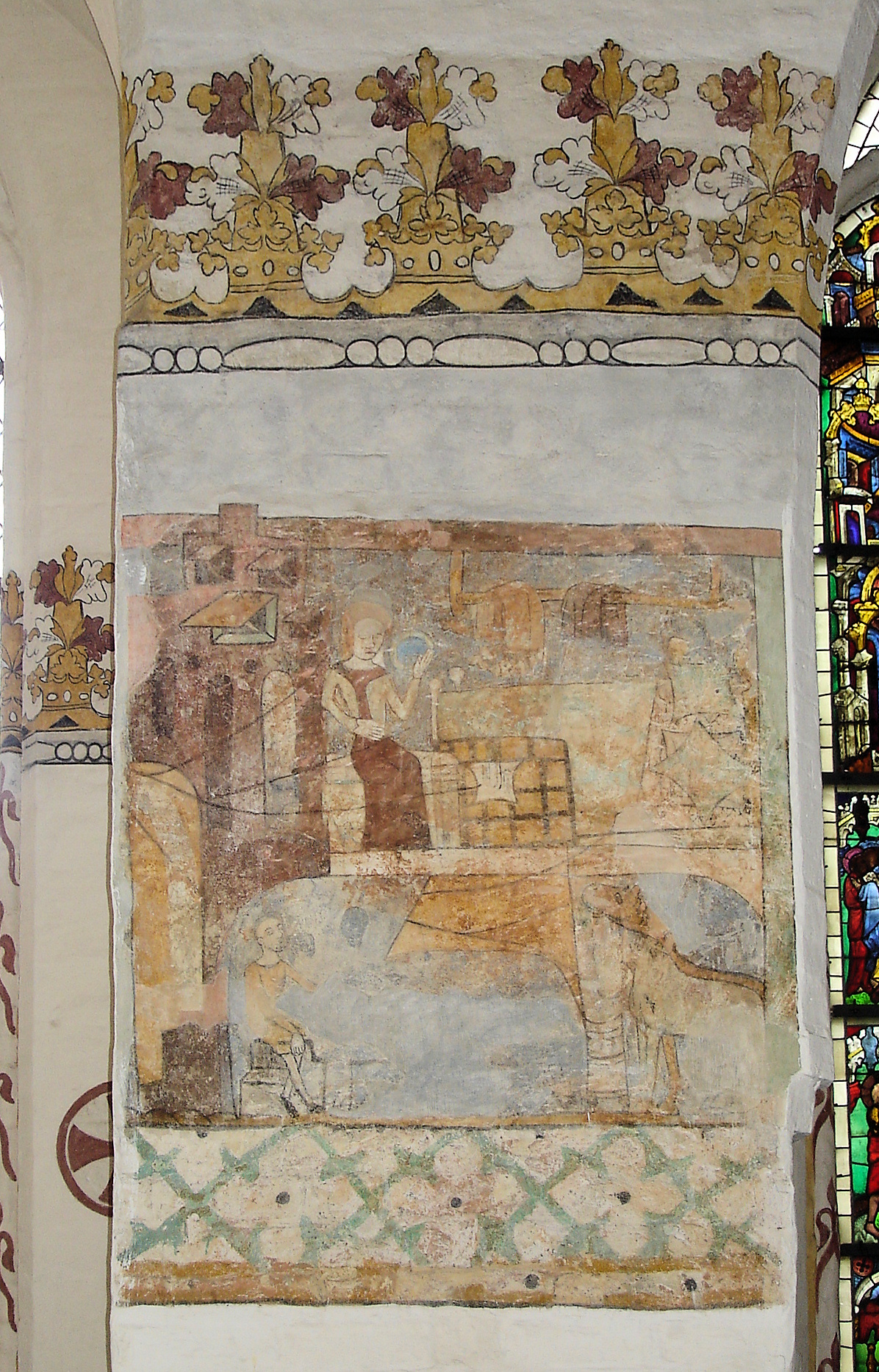 Wandmalerei in der Heiligen-Geist-Kirche Wismar, Mecklenburg-Vorpommern